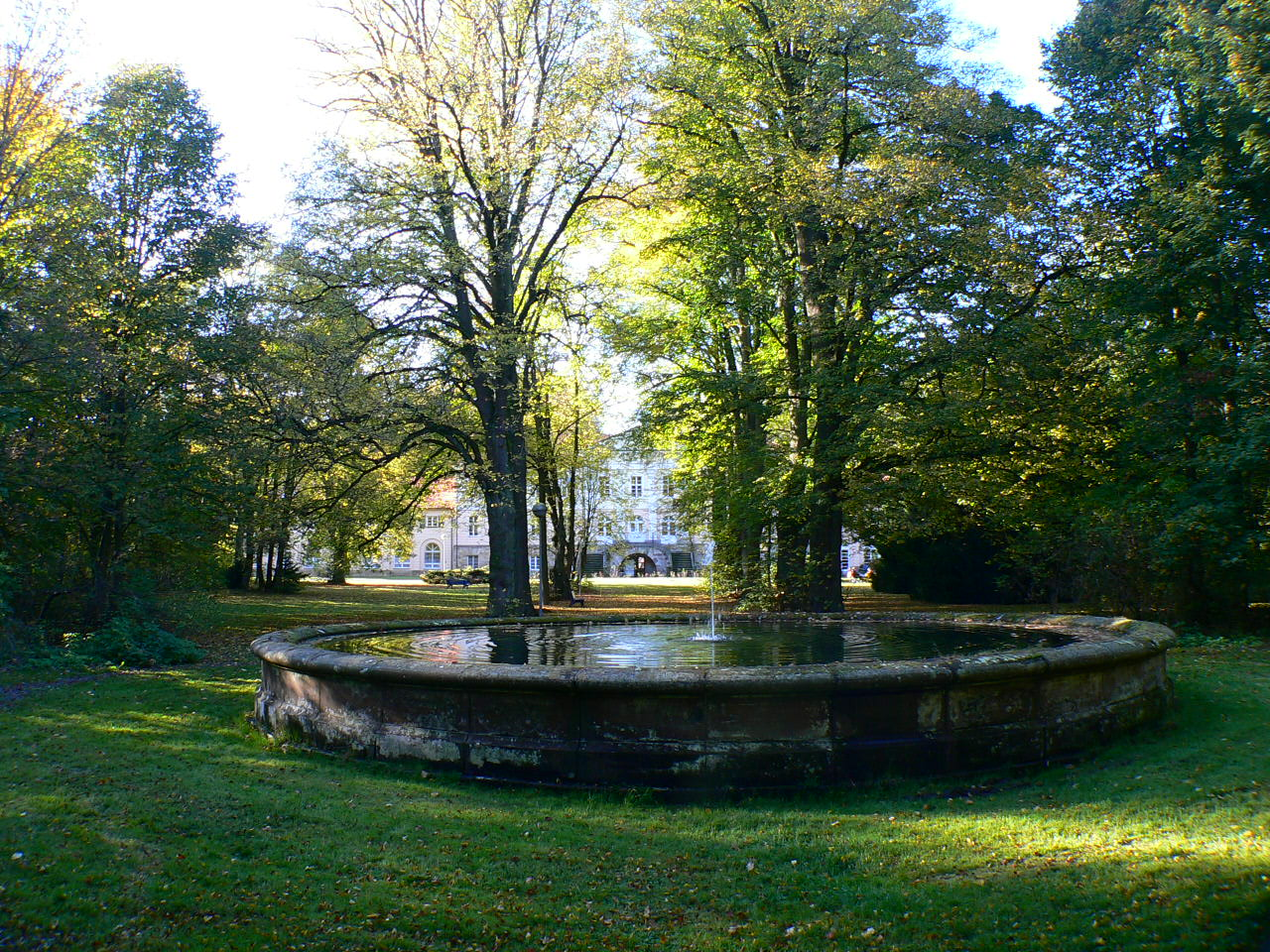 Schloss Beberbeck, Schlosspark mit Brunnen, in Hofgeismar-Beberbeck im Landkreis Kassel, Hessen, Deutschland